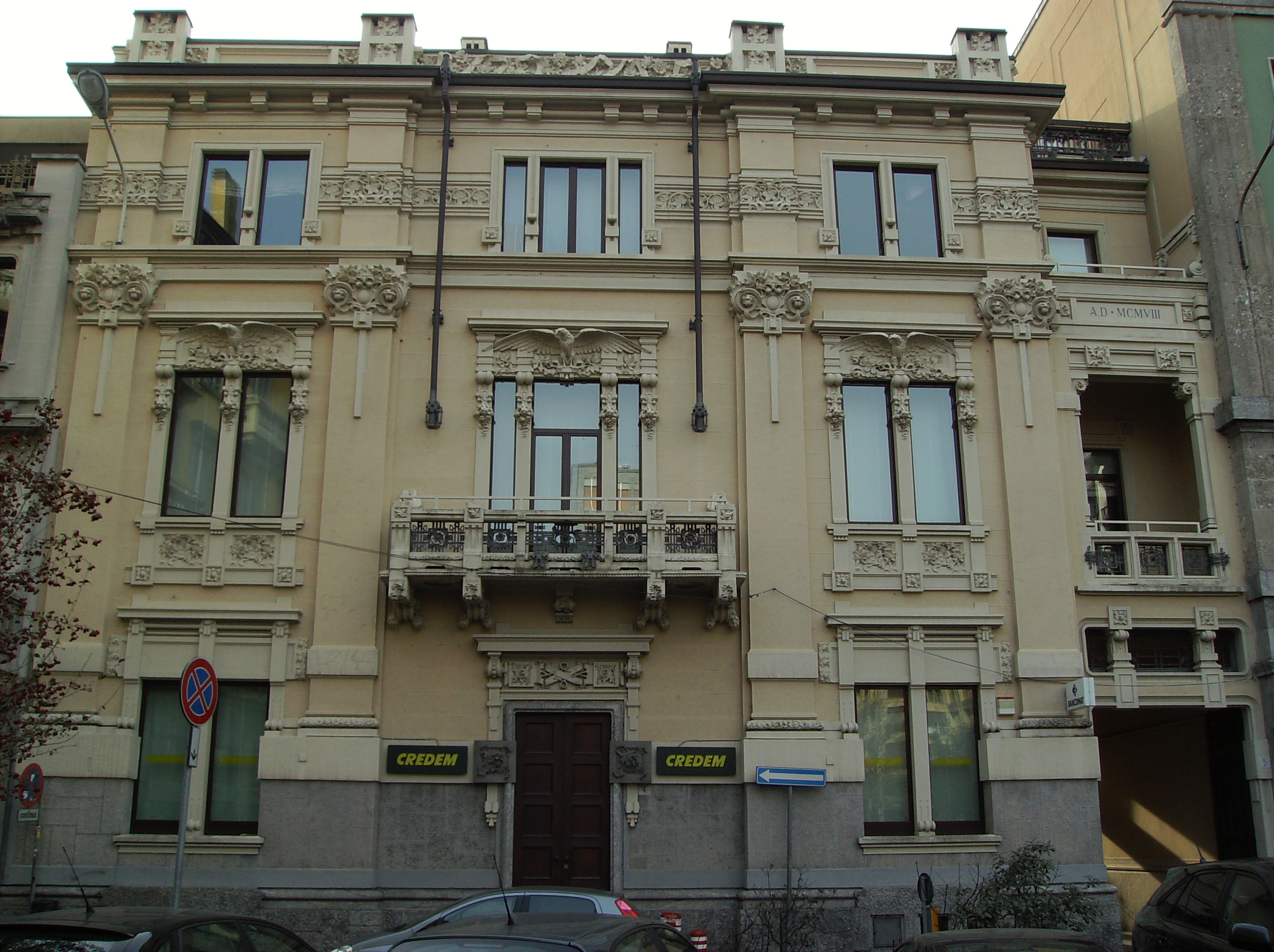 Palazzina Castiglioni - Busto Arsizio